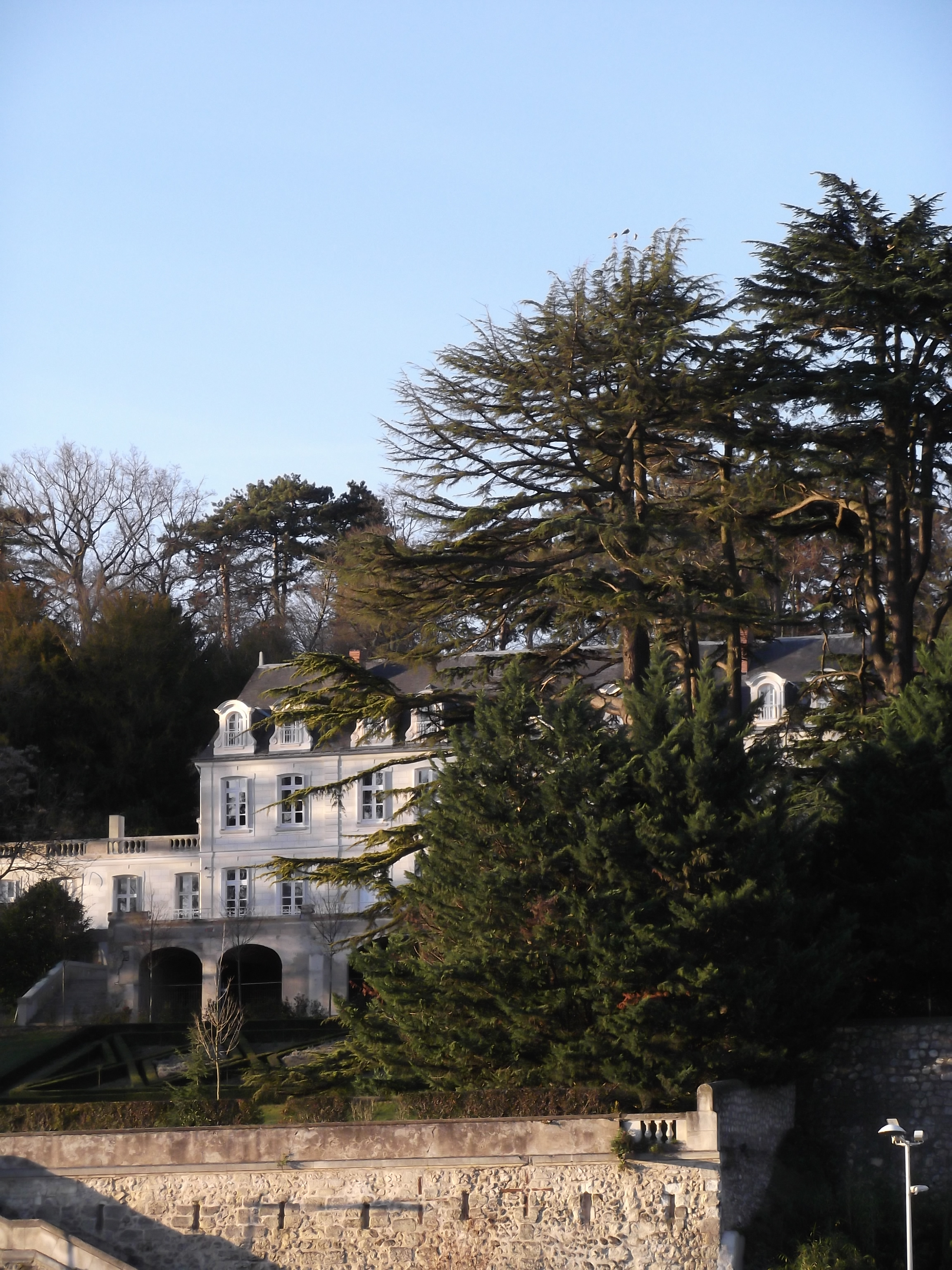 Demeure hôtel particulier à Saint-Cyr-sur-Loire.